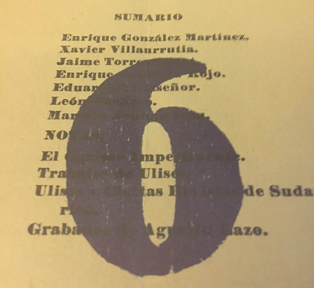 Foto del sumario de la sexta y última revista.